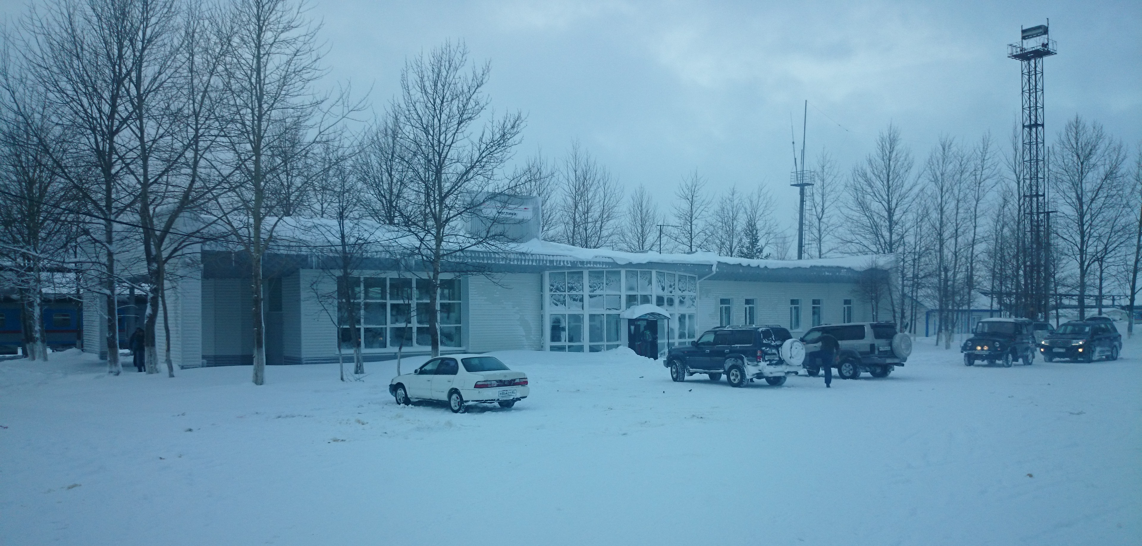 Nogliki train station